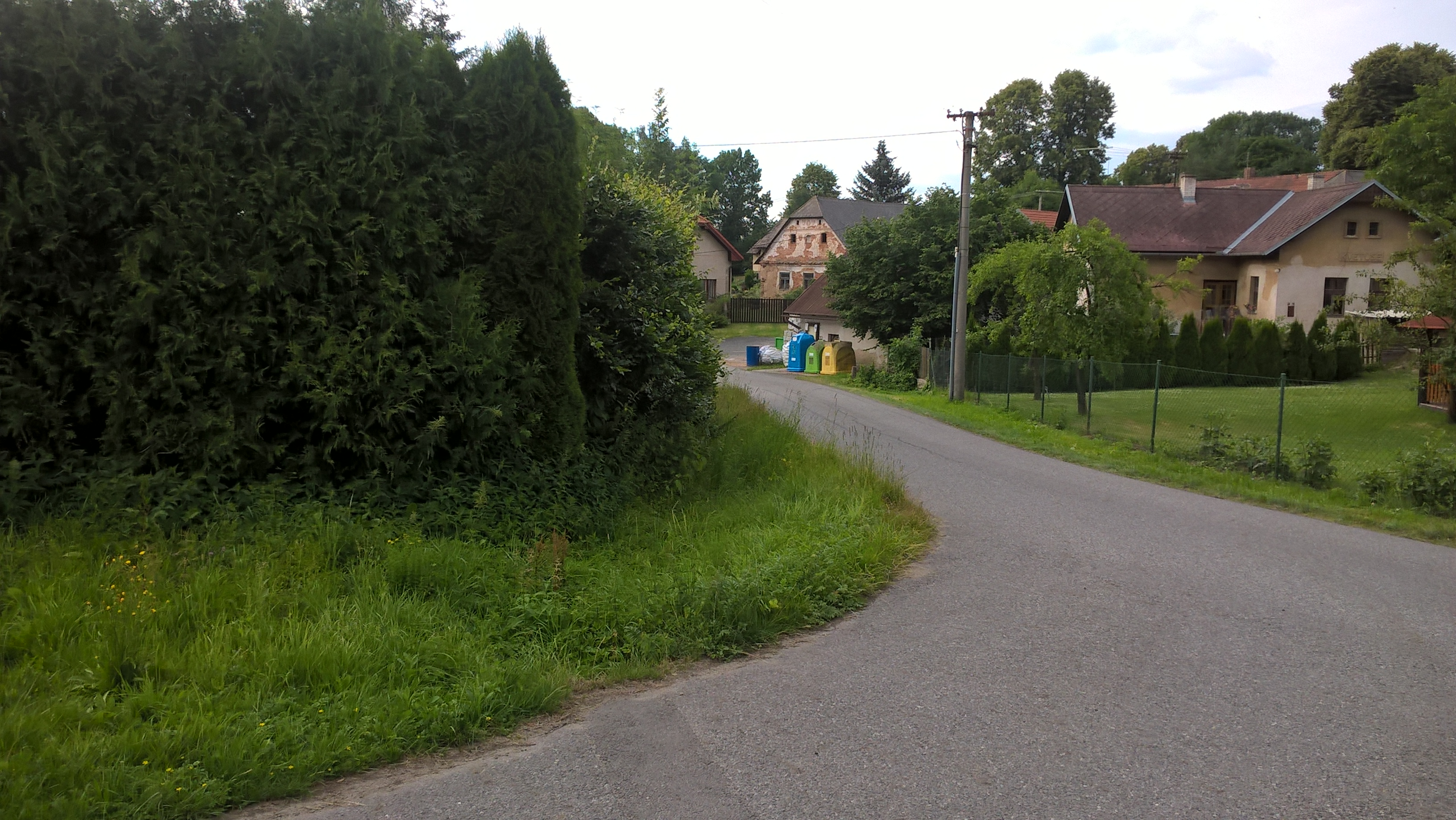 Náves ve Volichově (okres Havlíčkův Brod).